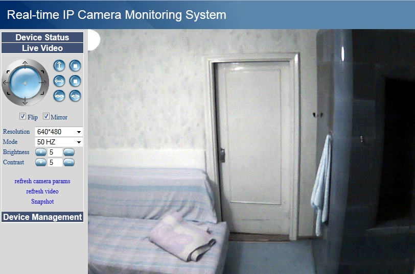 WiFI IP kaamera Foscam FI8908W kasutajaliides